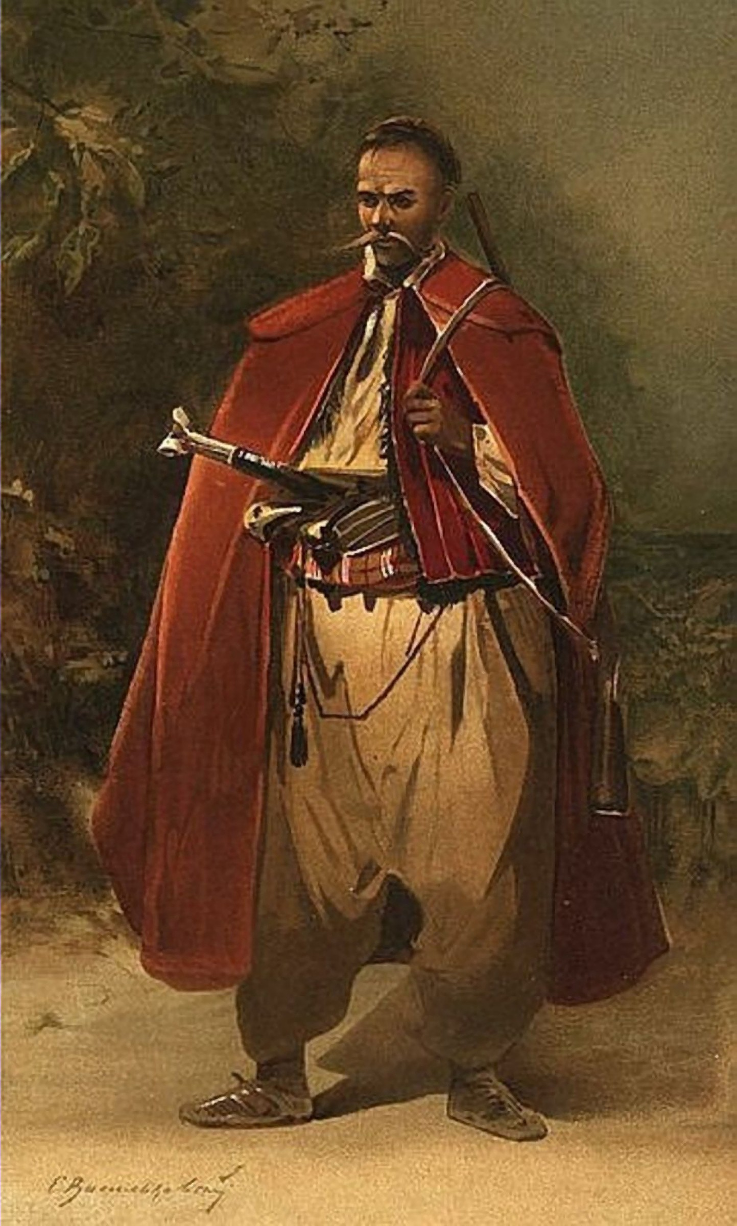 Задунайский запорожець. Акварель. 1900 р. Cossack from the Danubian Sich